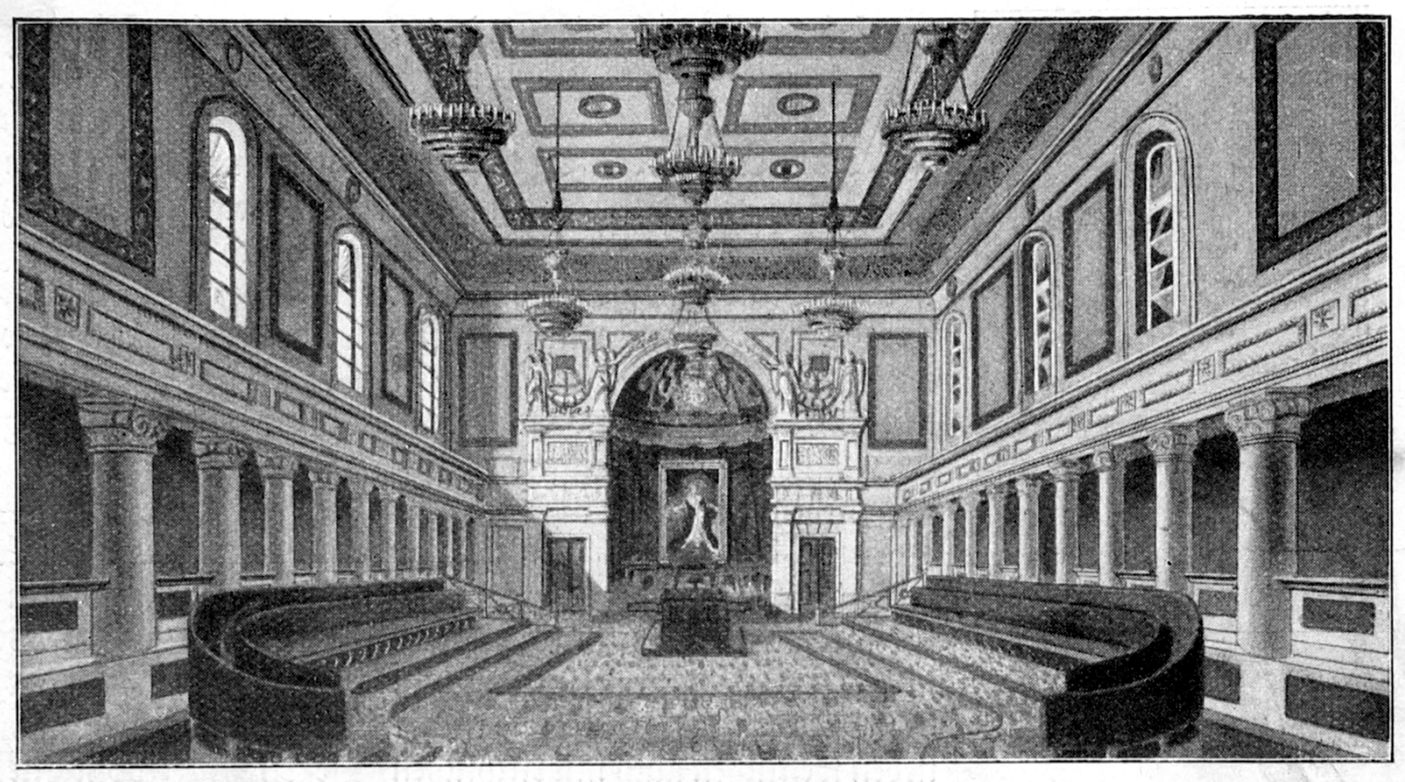 Sitzungssaal der Kammer der Abgeordneten im alten Ständehaus zu München